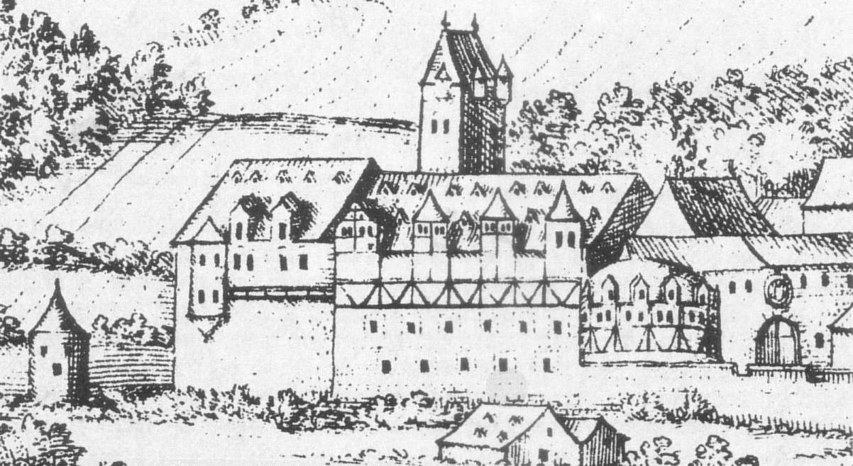 Welfenschloss (Hann. Münden) um 1560